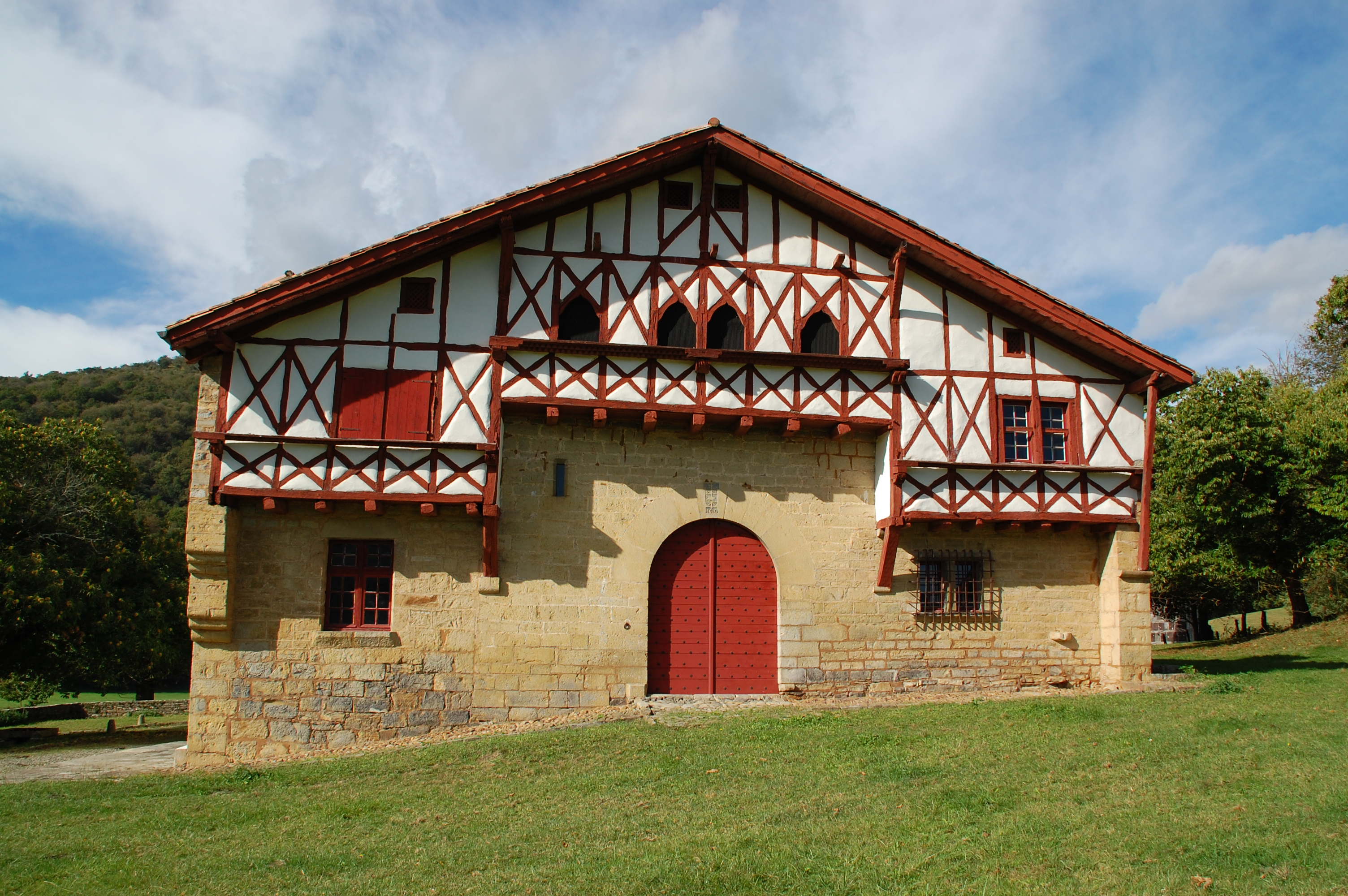 Salle d'Etxepare.